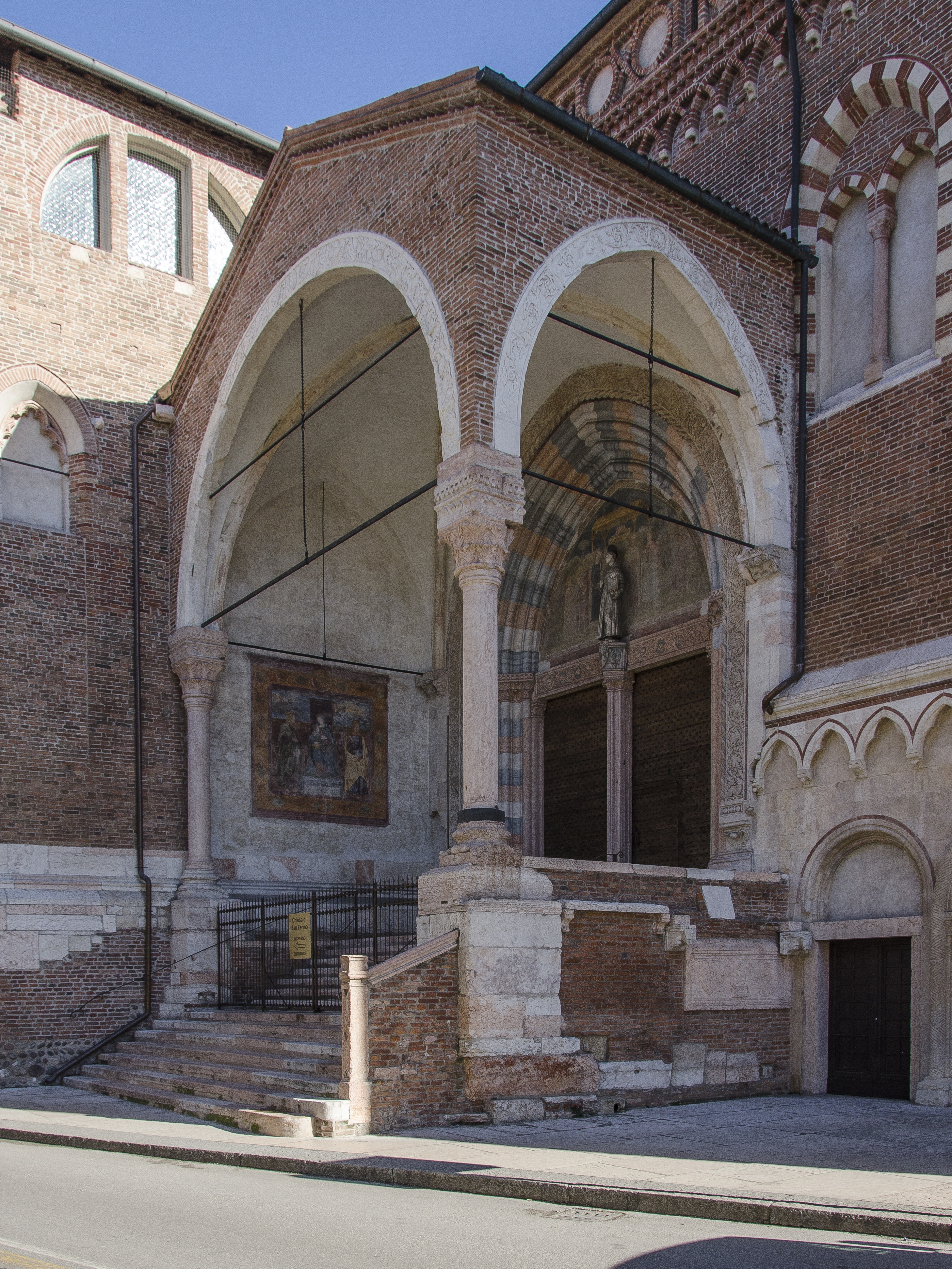 Fotografia dell'esterno